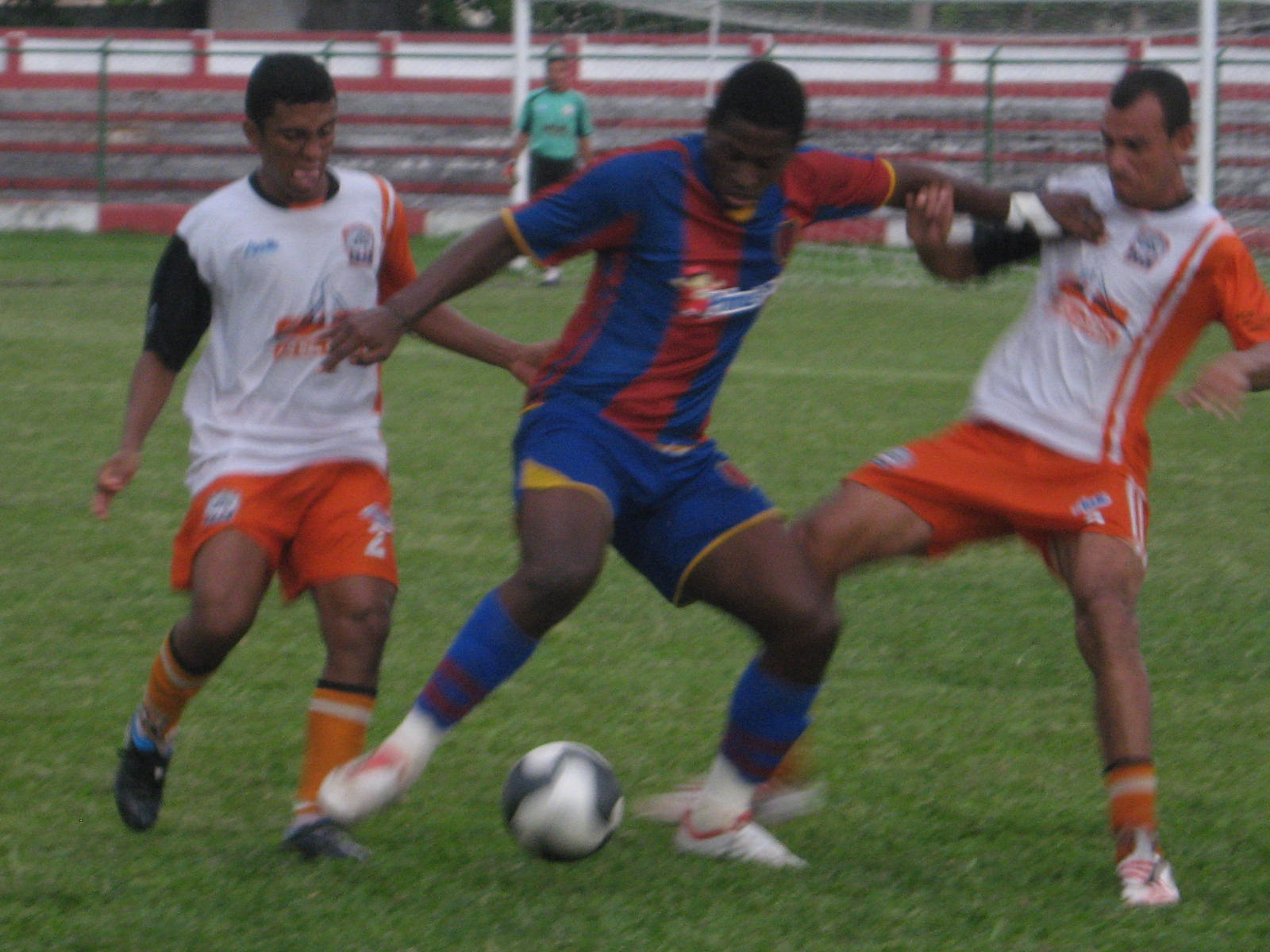 Riostrense 2x1 Bonsucesso, em 11/11/2009, local: Moça Bonita, estádio do Bangu AC.